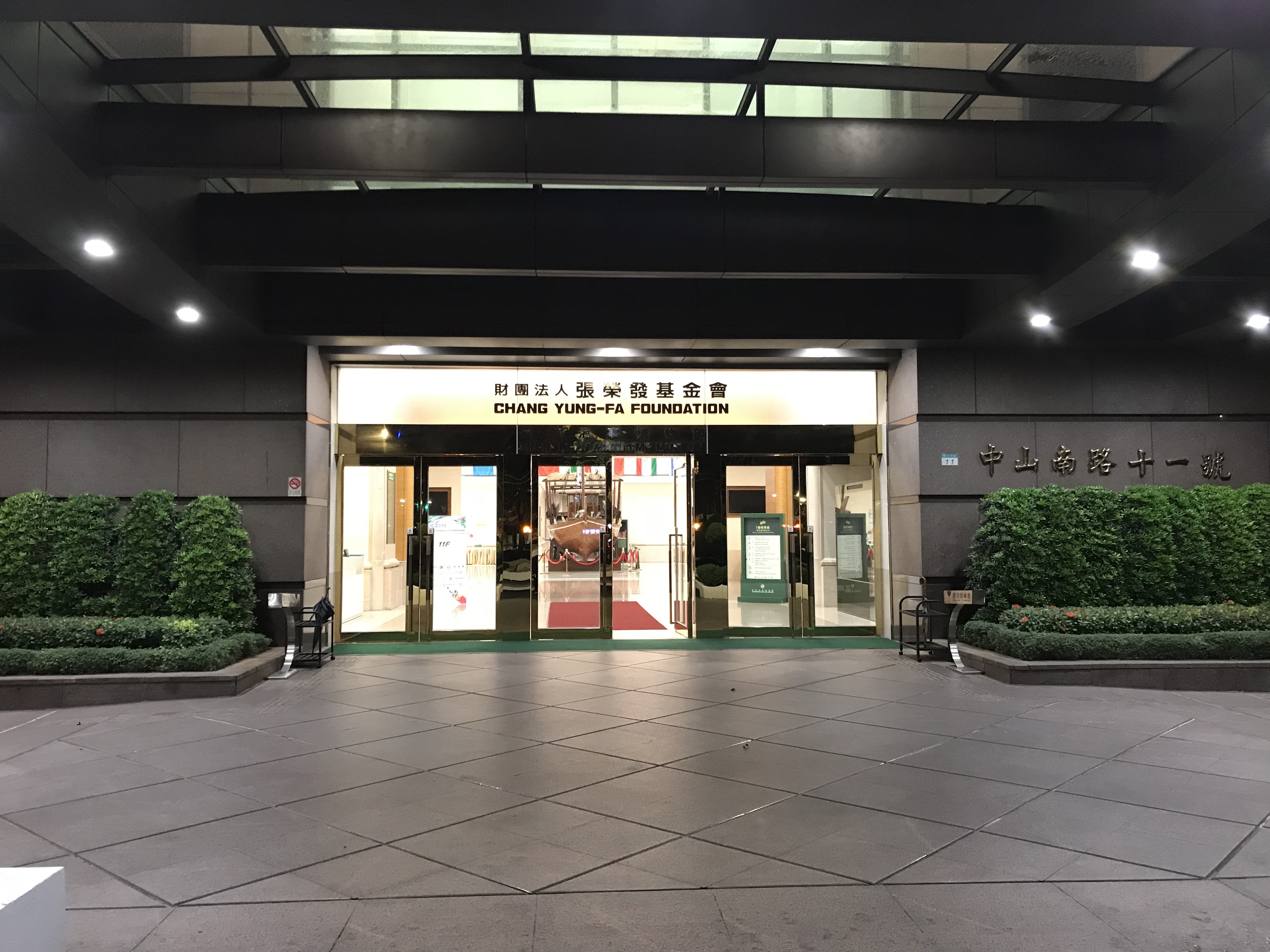 財団法人張栄発基金会ビル（張榮海事博物館）の玄関。